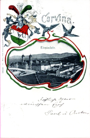 Couleurkarte der Gymnasialverbindung Corvinia Einsiedeln